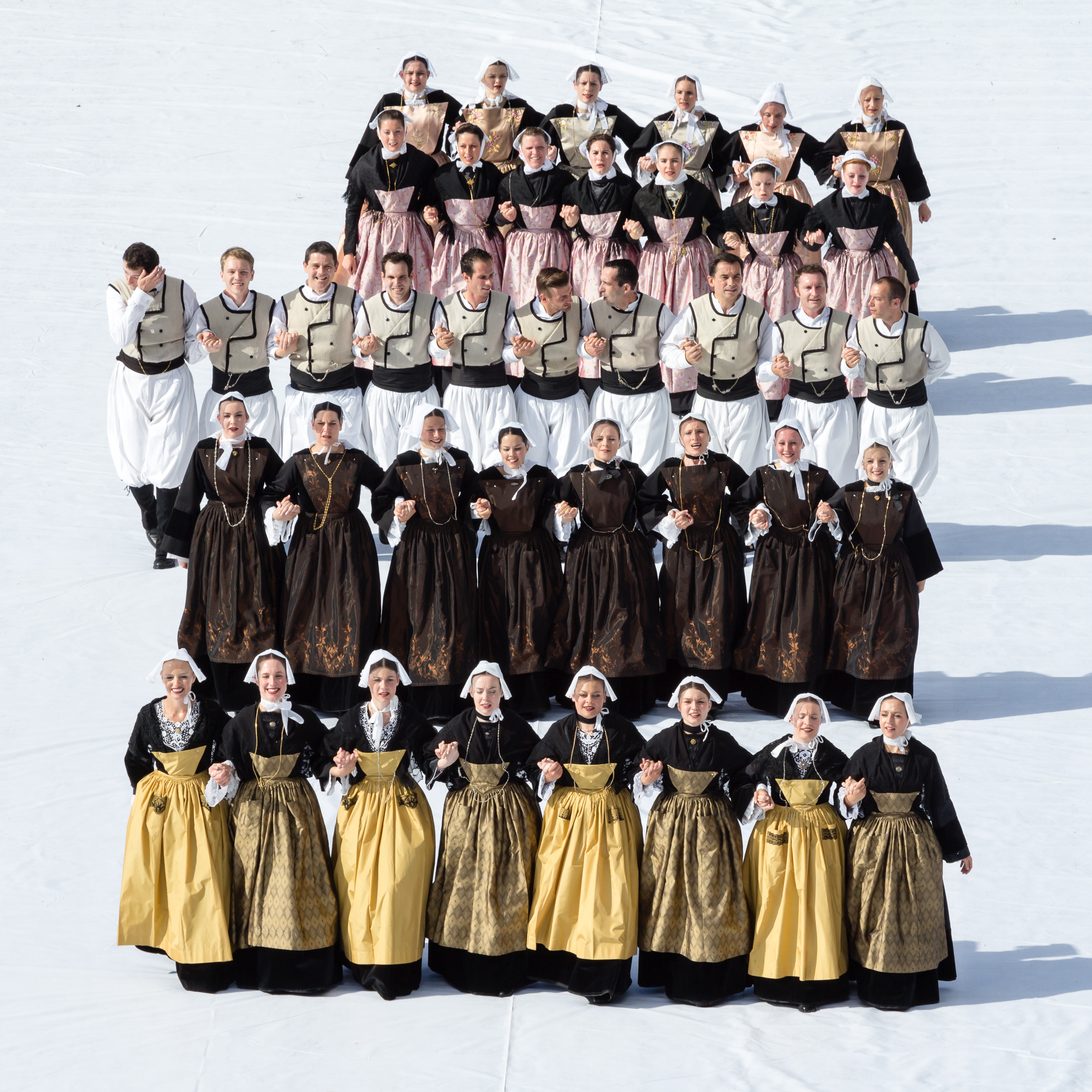 FIL 2012 - Arrivée de la grande parade des nations celtes - Kevrenn Alre